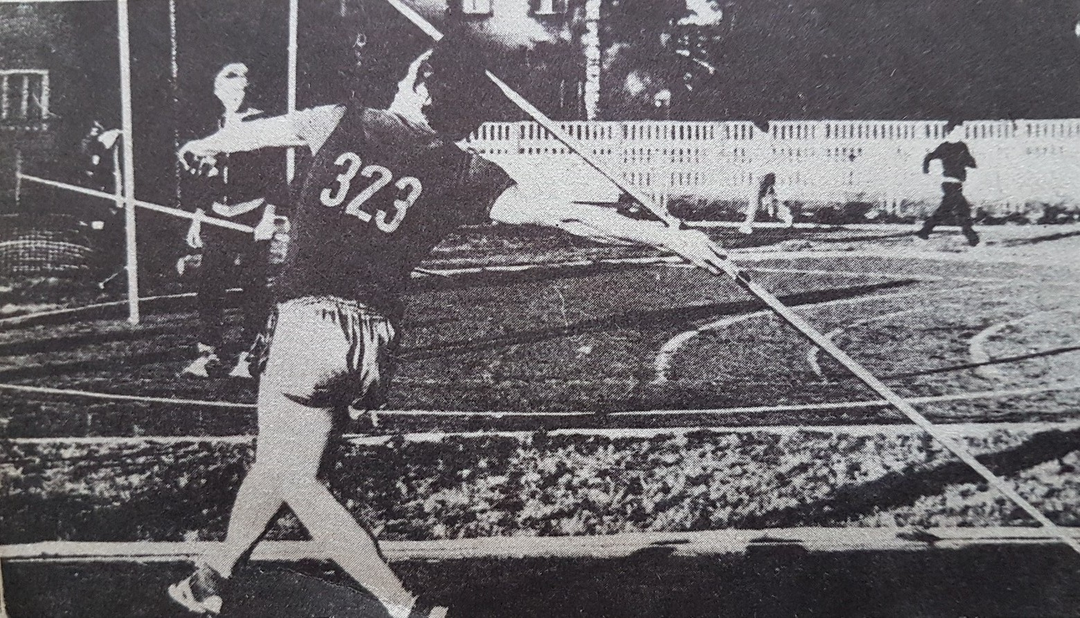 Zawody w Stargardzie, LKS Pomorze